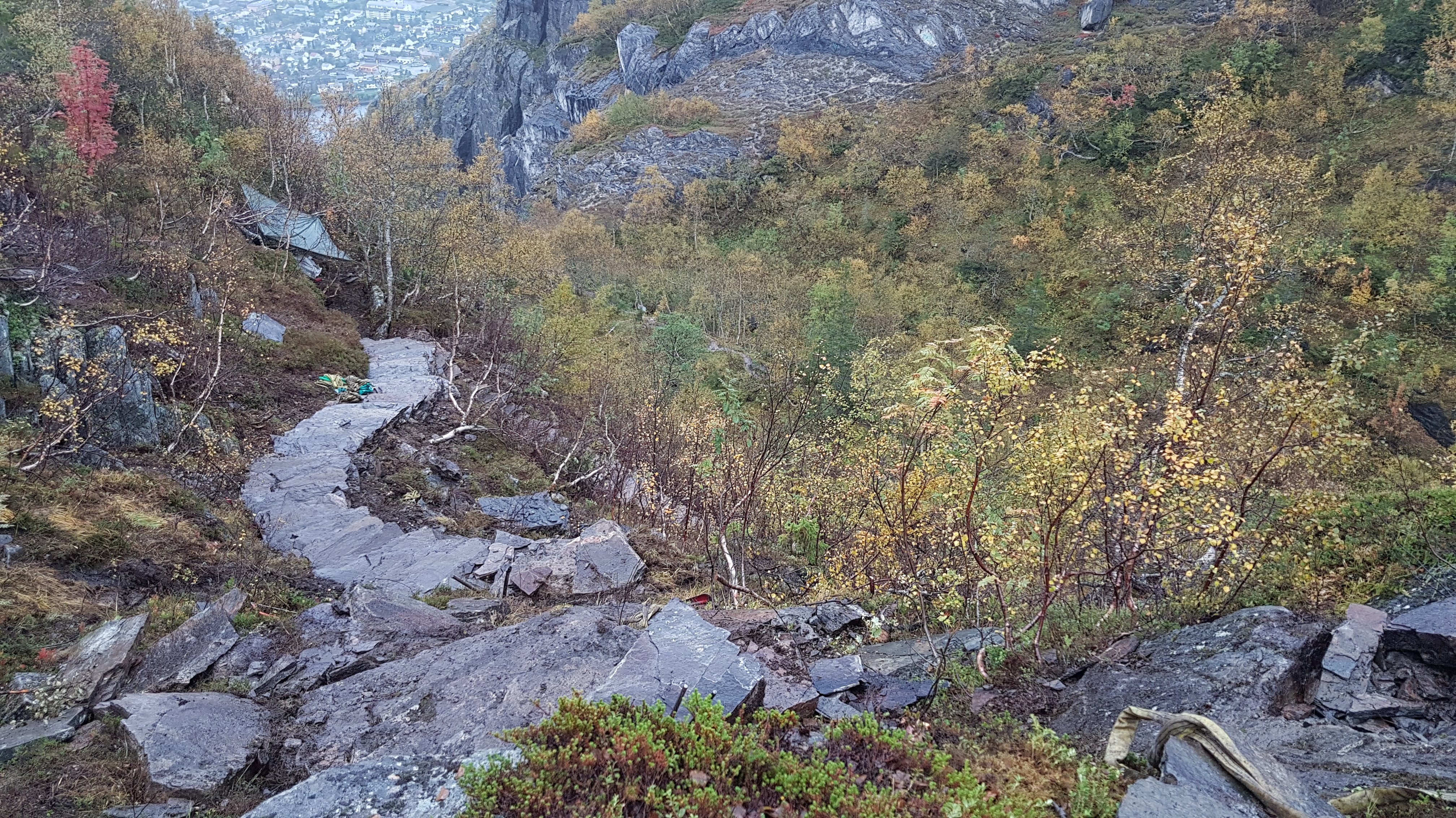 Arbeidet godt i gang ovenfor Trongskardet.